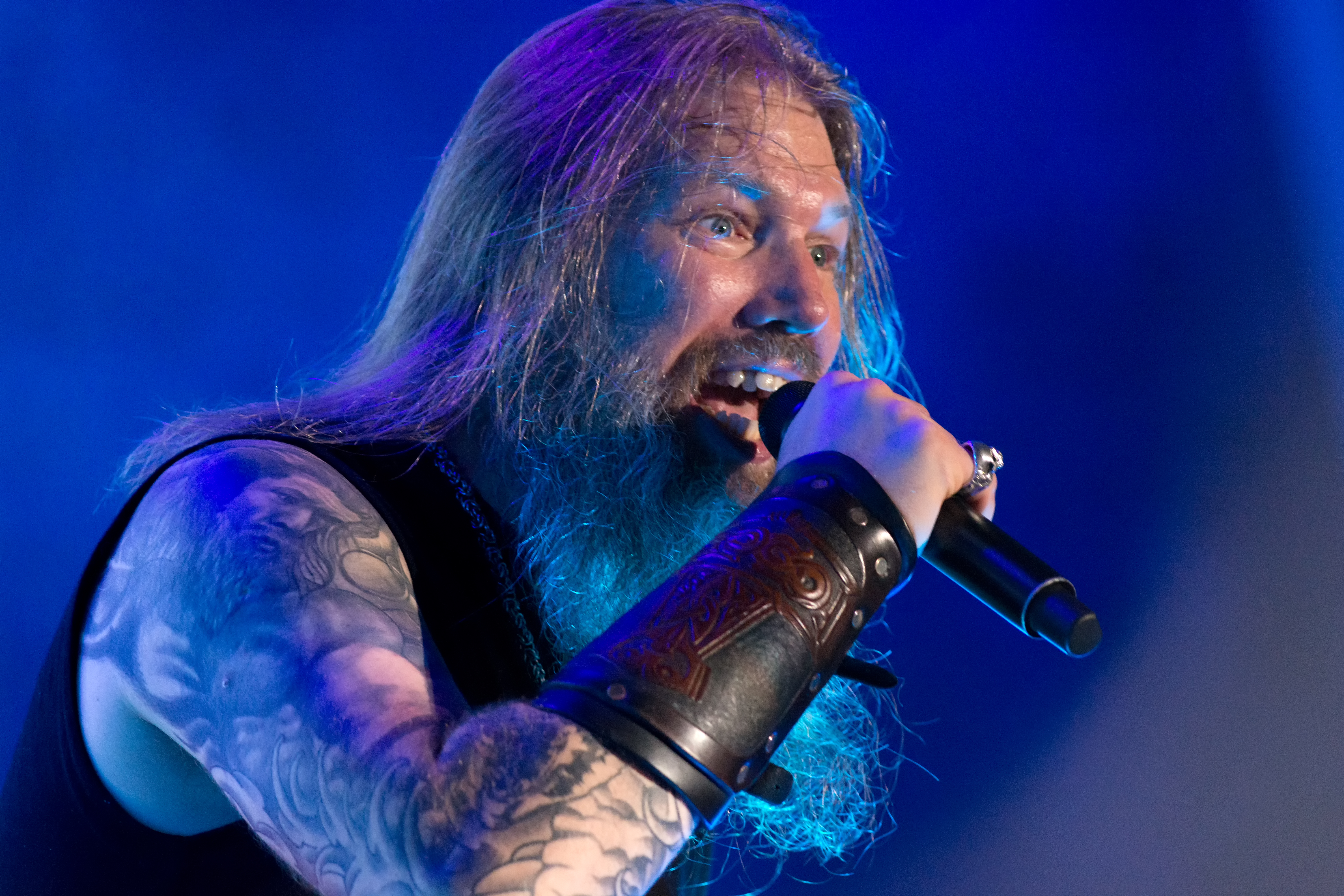 Amon Amart live bein Reload Festival 2017